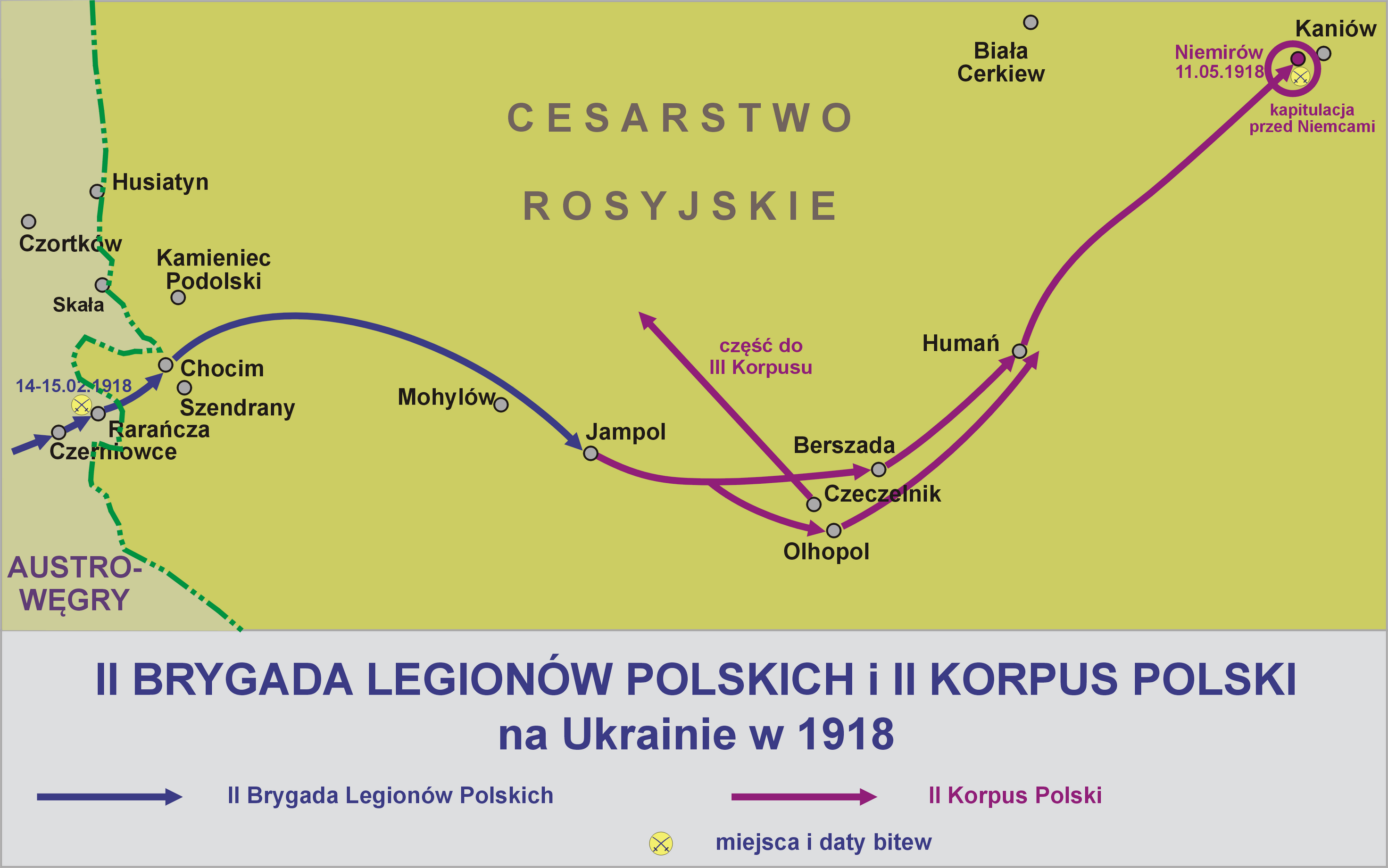 II Brygada Legionów Polskich i II Korpus Polski na Ukrainie 1918